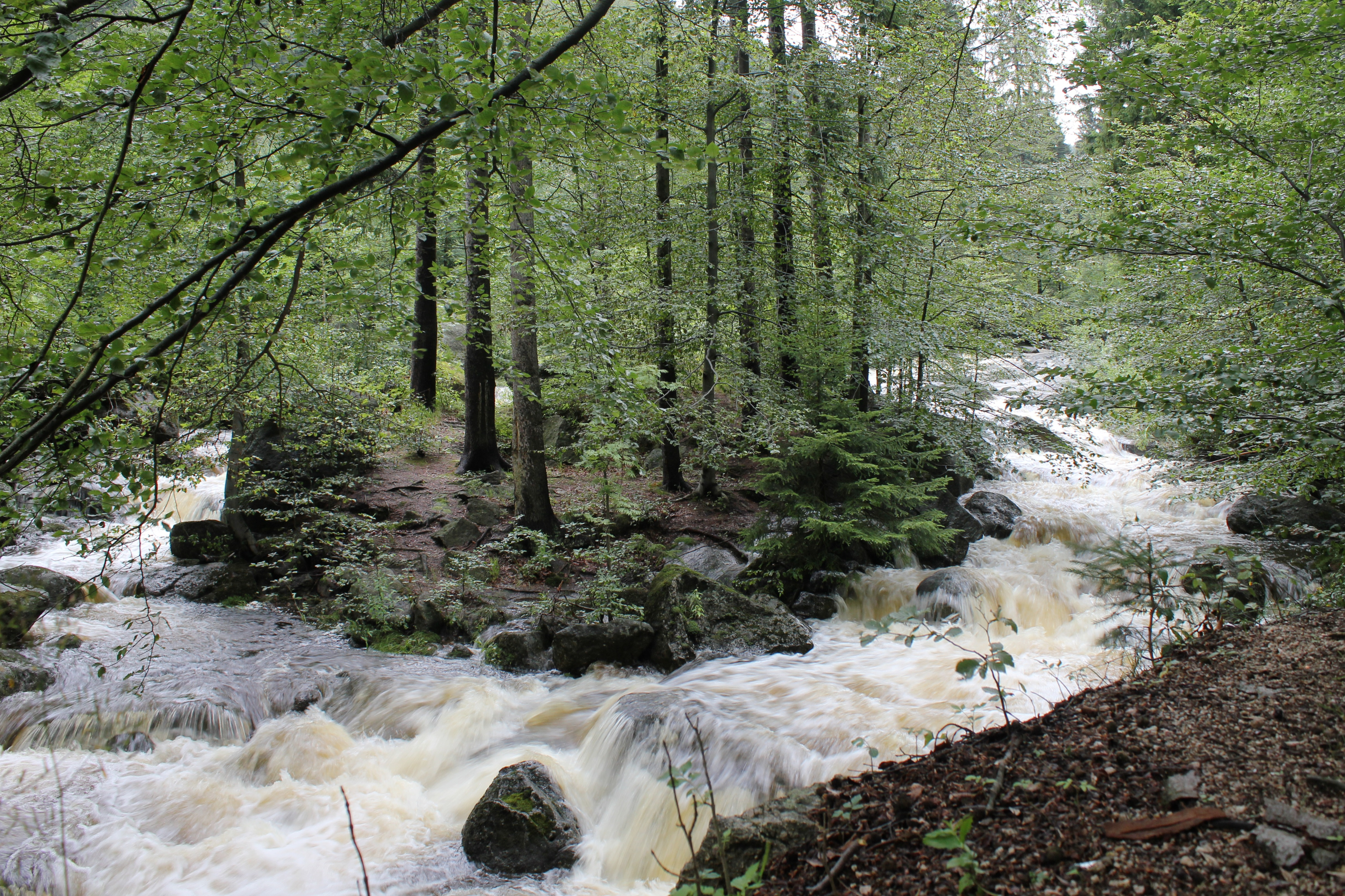 Černá Desná